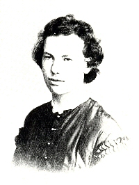 Foto Irma von Troll (1847-1912) Schriftstellerin und Frauenrechtlerin